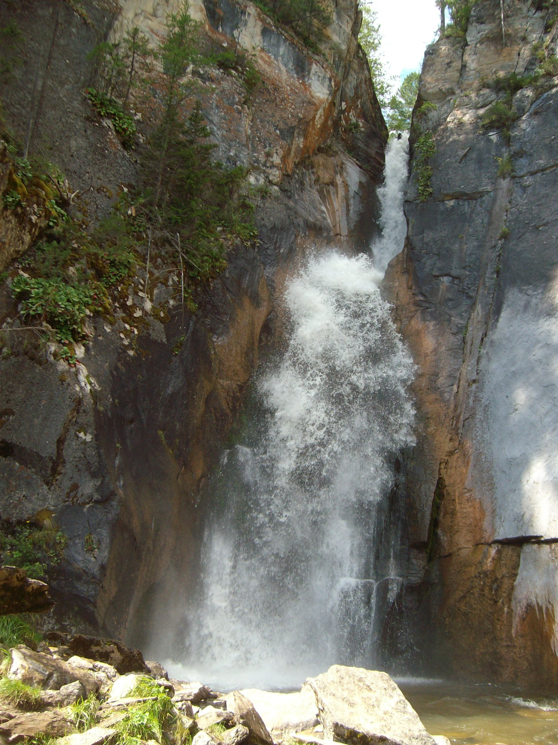 Водопад Двойной прыжок на реке Шинок